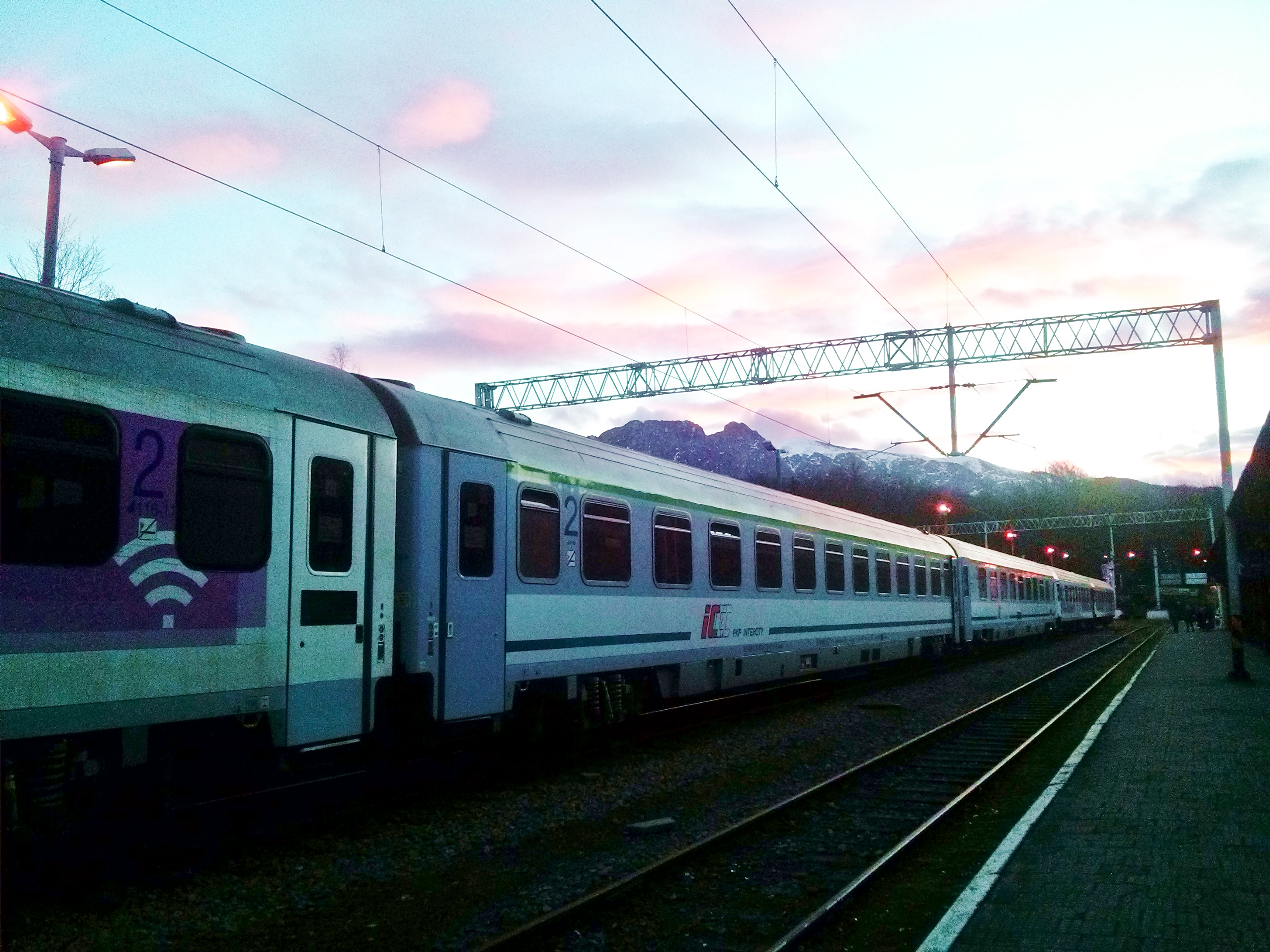 Pociąg EIC TATRY relacji Zakopane-Warszawa Wschodnia